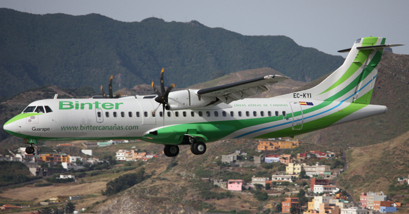 Eine Maschine der Binter Canarias im Anflug auf Teneriffa Nord.